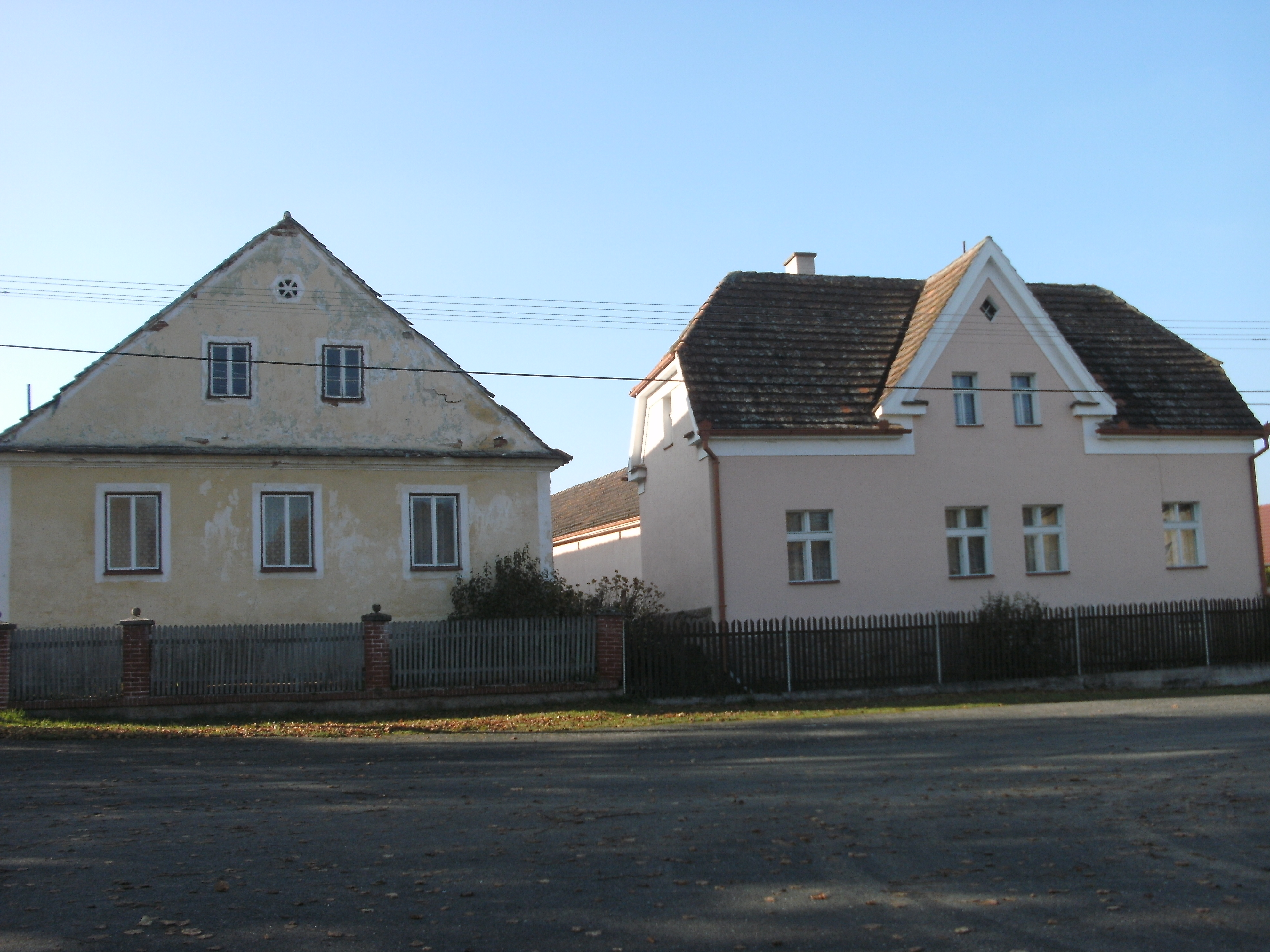 Häuser und Ortsansichten von Křakov, Ortsteil von Mířkov